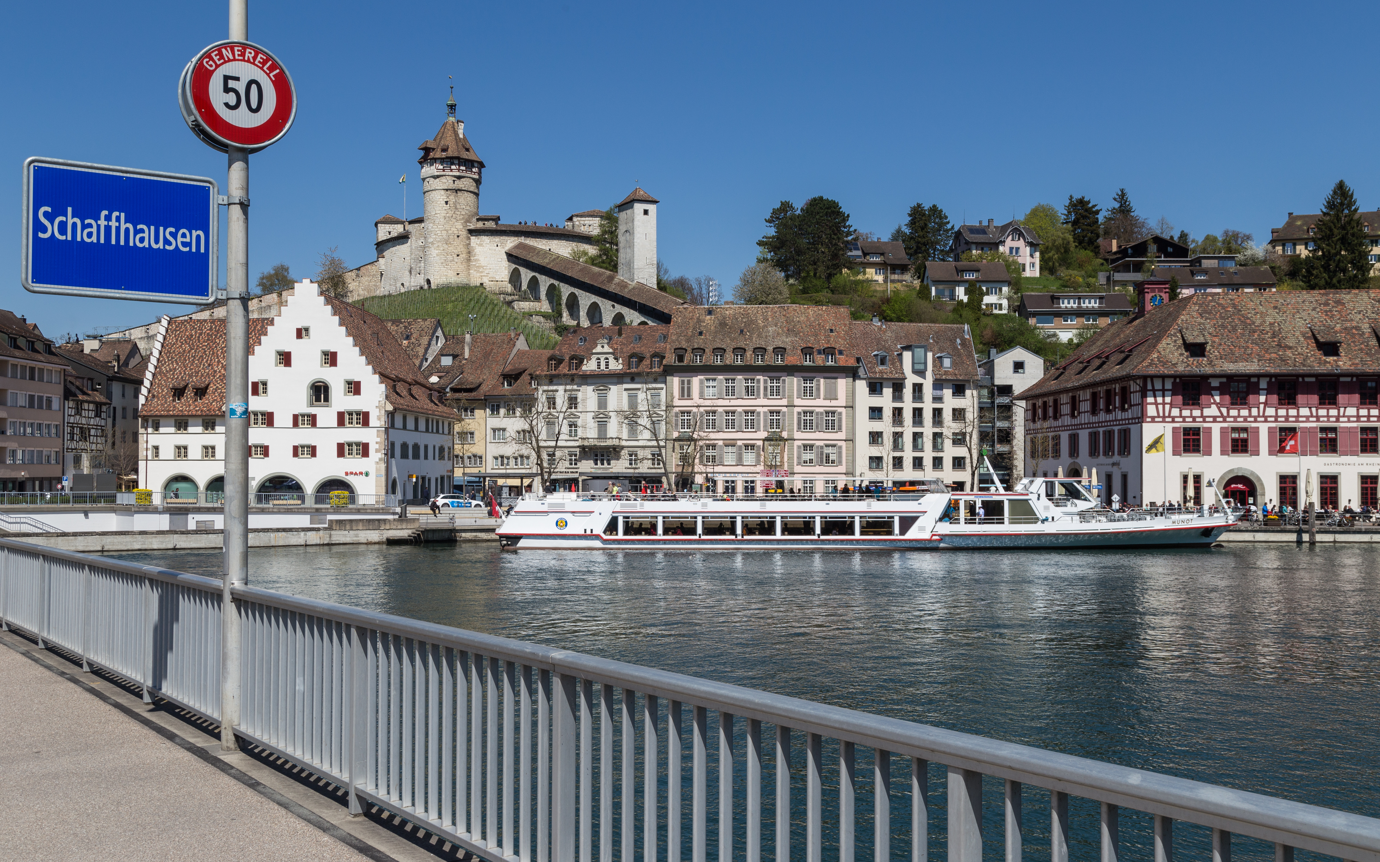 Schaffhausen mit Munot, Rhein & MS Munot